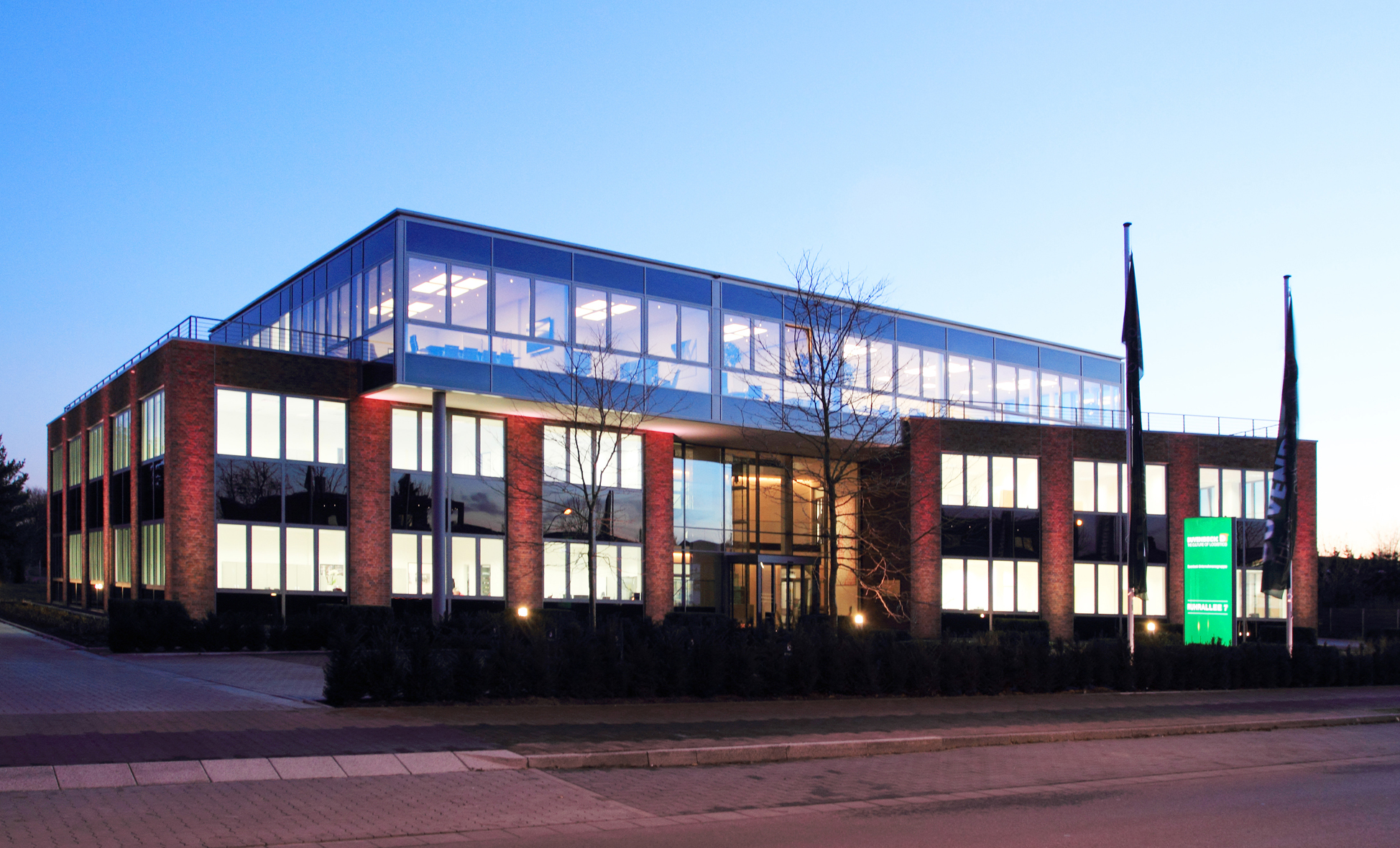 Die Kulturzentrale wurde 2012 eingeweiht.